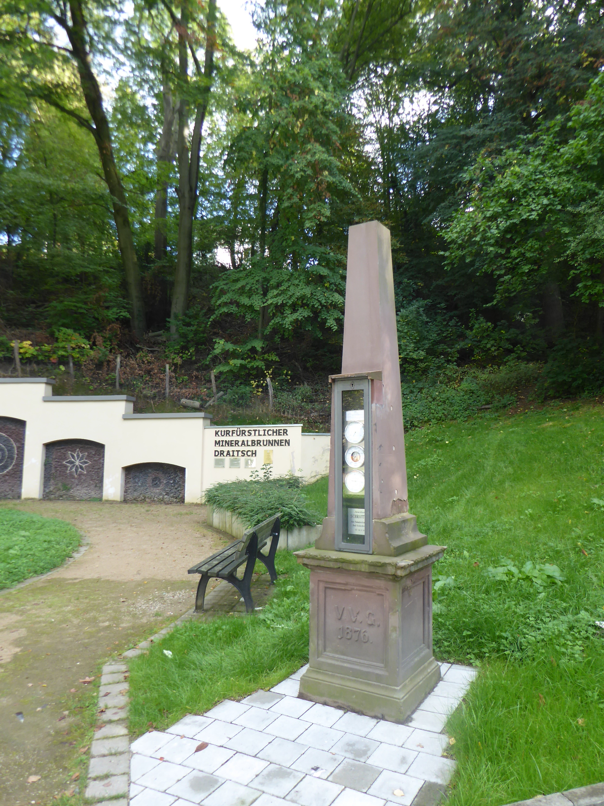 Die älteste Wettersäule Deutschlands (1876) am Godesberger Draitschbrunnen